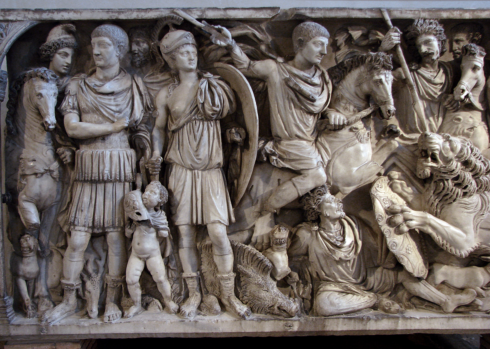 Le Tombeau de Jovin. Sarcophage romain du 3ème siècle, apporté à Reims par Flavius Jovinus, général en chef de l'armée romaine en Gaule sous le règne de Valentinien 1er (règne de 364 à 375); il a acheté à Rome ce sarcophage sculpté un siècle plus tôt et il a fait retailler la tête du cavalier à son effigie. Musée Saint-Remi à Reims.